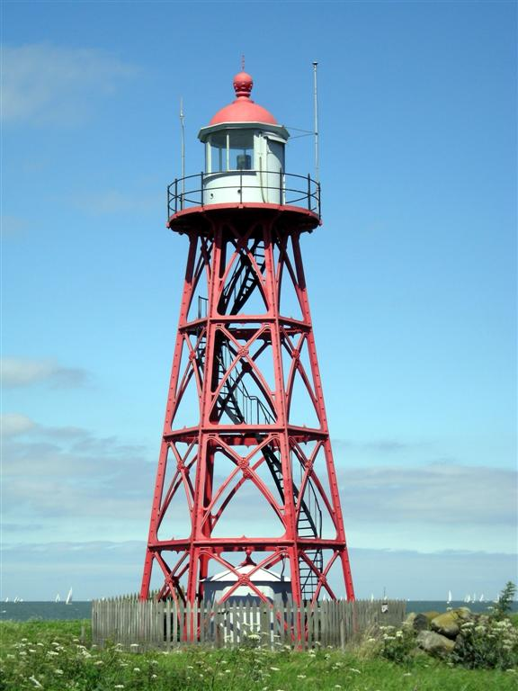 Vuurtoren in Stavoren